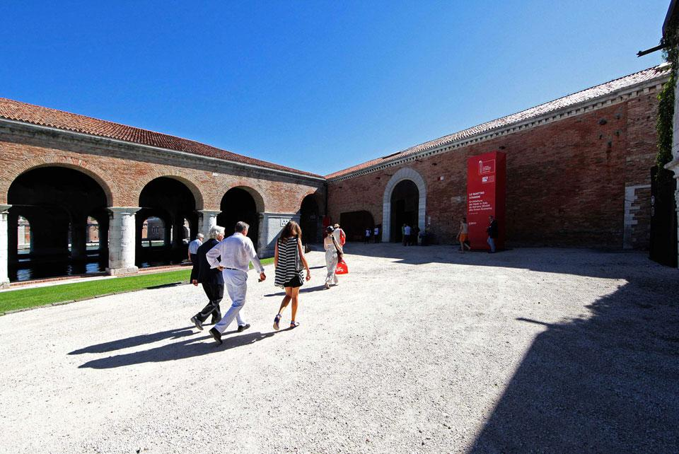 Esterno padiglione Italia